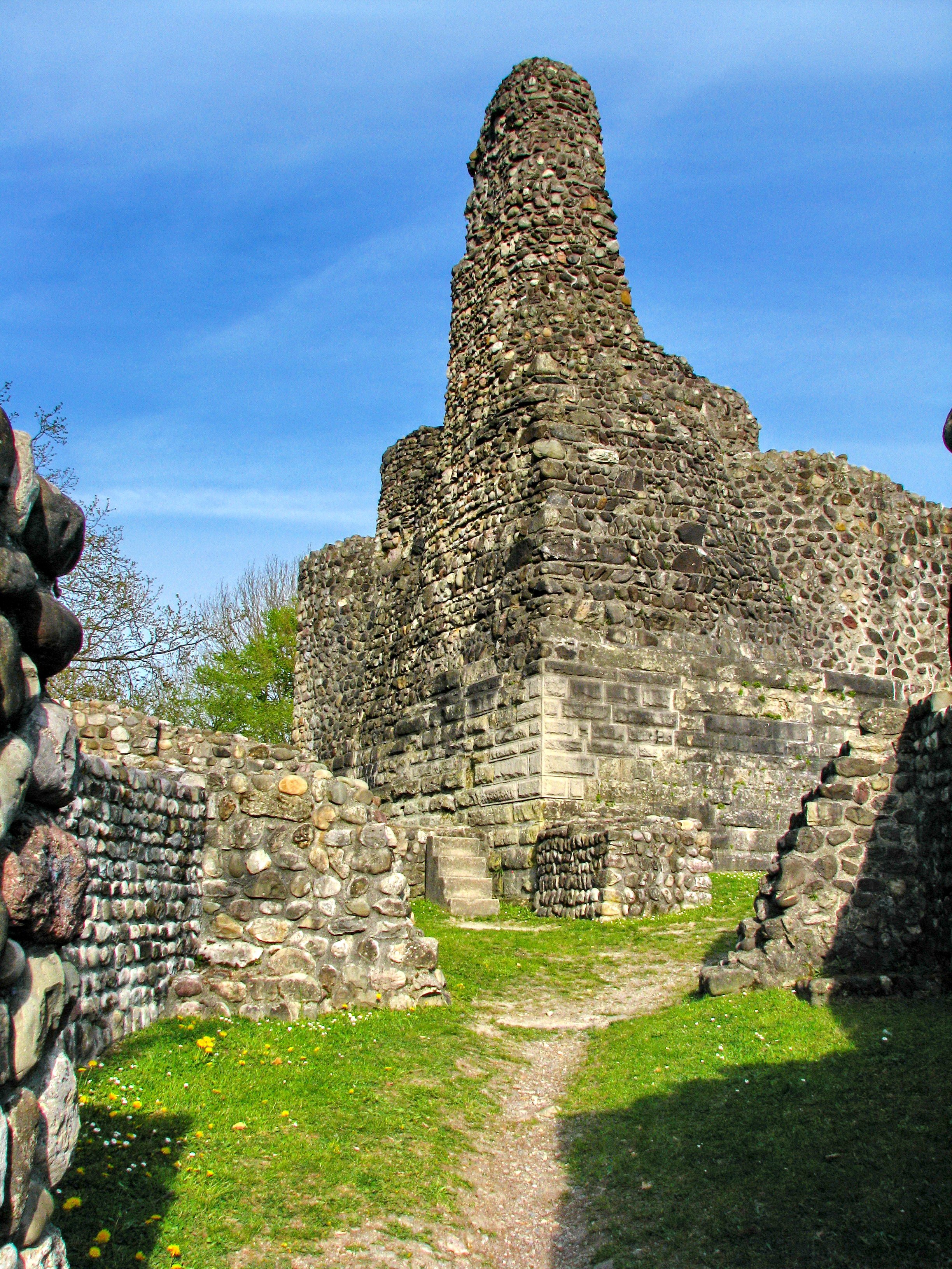 Altburg (Alt-Regensberg) in Regensdorf (ZH)